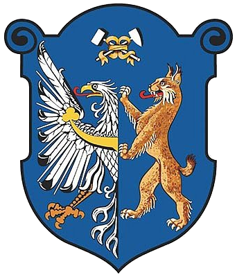 Znak města Kladna Původní podoba znaku s polovinou orlice (připomínající znak majitelů Kladna Žďárských ze Žďáru) a rysem (pravděpodobně symbol hojných lesů v okolí Kladna) byla ustanovena privilegiem Ferdinanda I. z 22. prosince cs:1561. Hornická kladiva do znaku přidal František Josef I. 5. srpna cs:1914. V 60. až 80. letech 20. století bývala nad kladiva umisťována červená pěticípá hvězda; tento doplněk však ani v oné době nebyl městu oficiálně schválen. Na rozdíl od většiny českých měst Kladno běžně užívá znak ne na prostém, ale zdobeném štítě, jaký byl v municipální heraldice užíván v době polepšení z roku 1914.